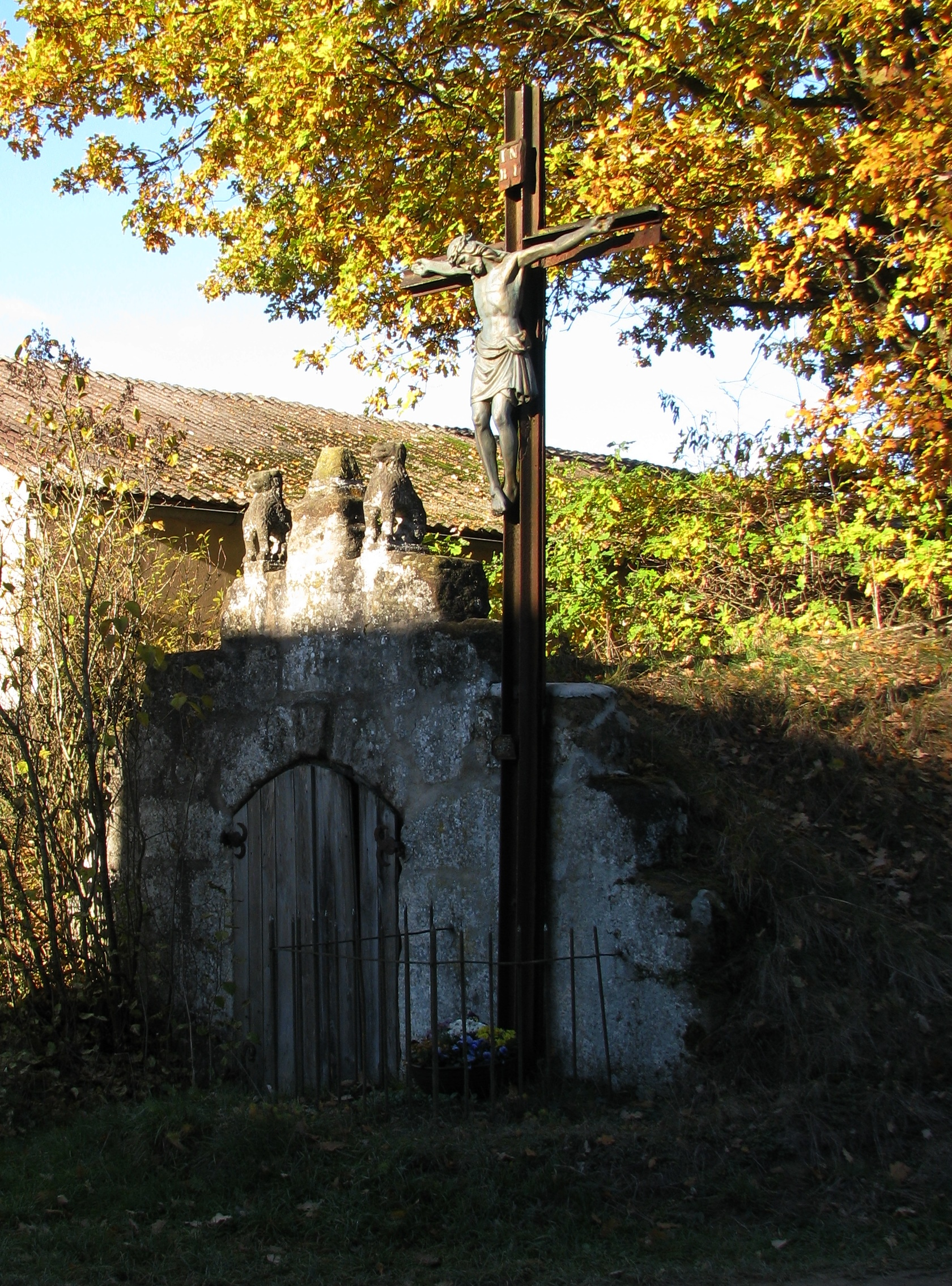 Schweizermühle, Ortsteil von Hilpoltstein im mittelfränkischen Landkreis Roth, Kreuz im Mühlenanwesen